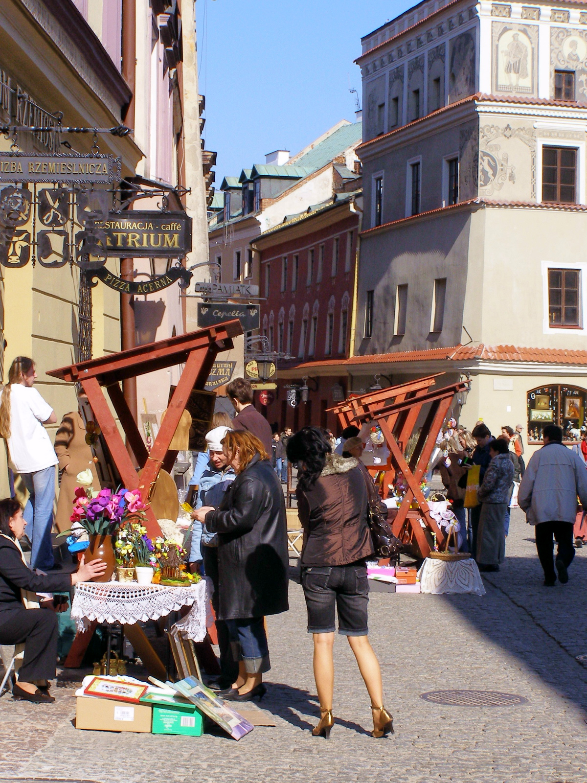 Stare Miasto, Kiermasz na Rynku w Lublinie